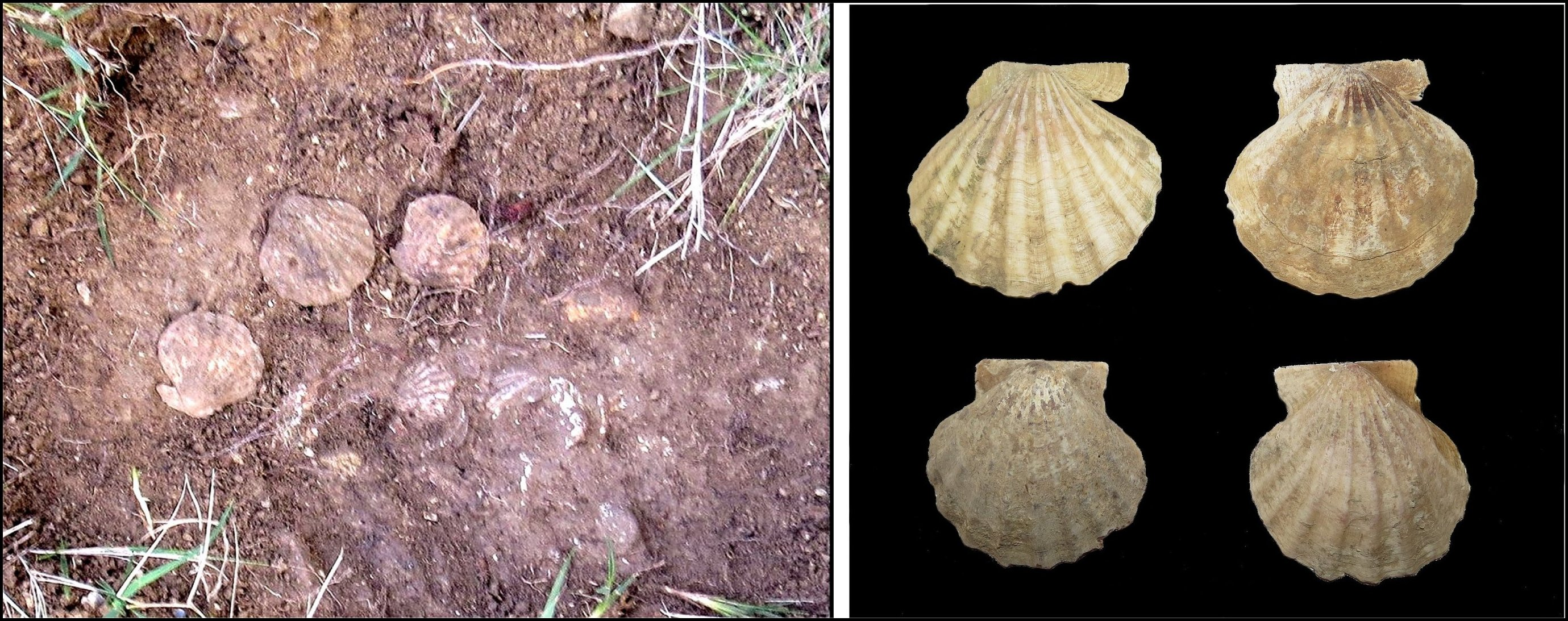 Valves de Flexopecten glaber (Bivalves, Pectinidae), à gauche in situ dans le dépotoir, à droite isolées (face externe). Dépotoir, villa gallo-romaine de Vivios, Lespignan (Occitanie)